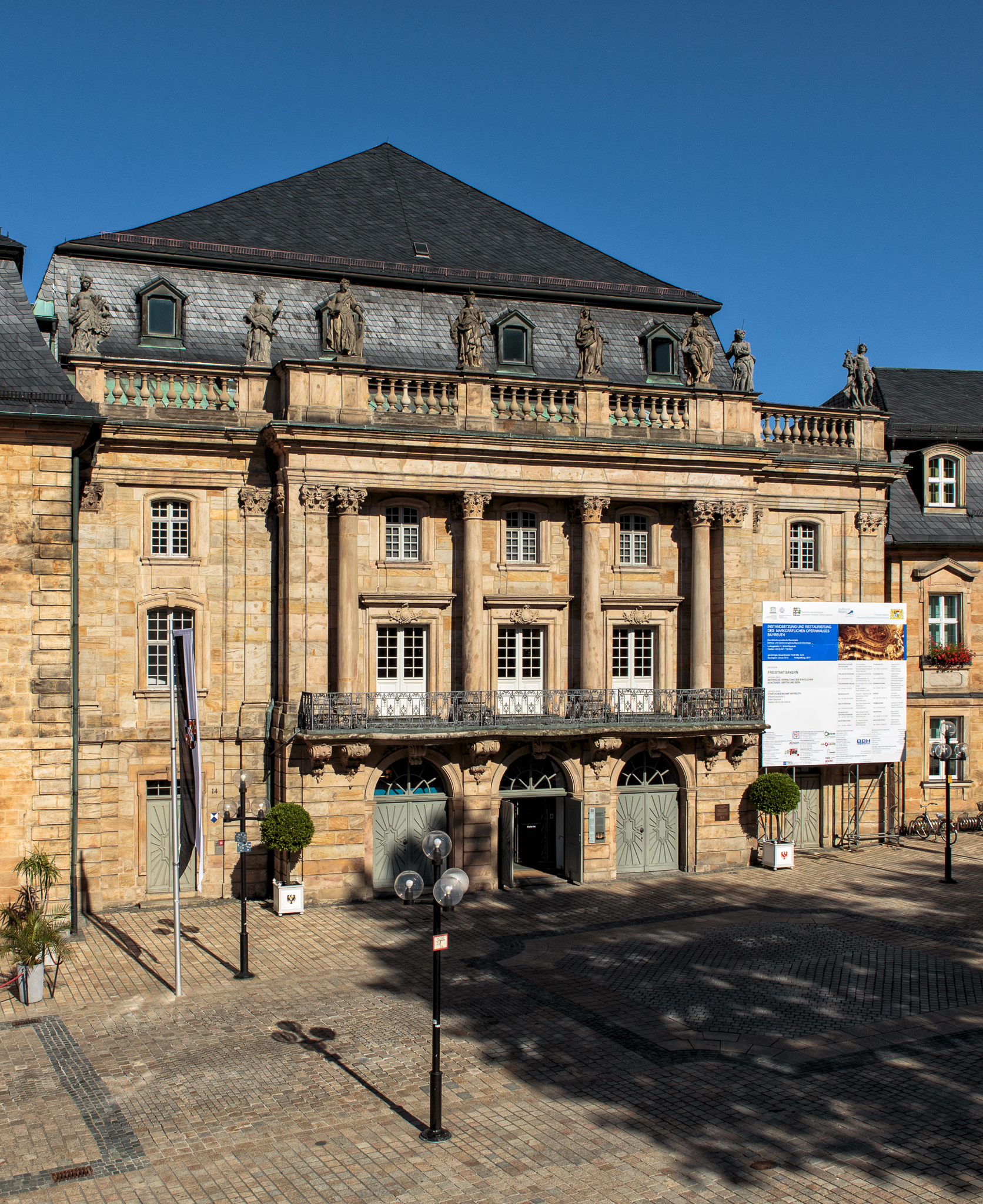 Markgräfliches Opernhaus - Bayreuth - 2013